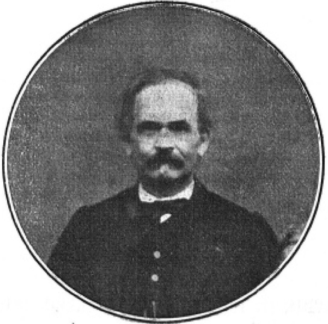 Portrait de Lucien Leclerc